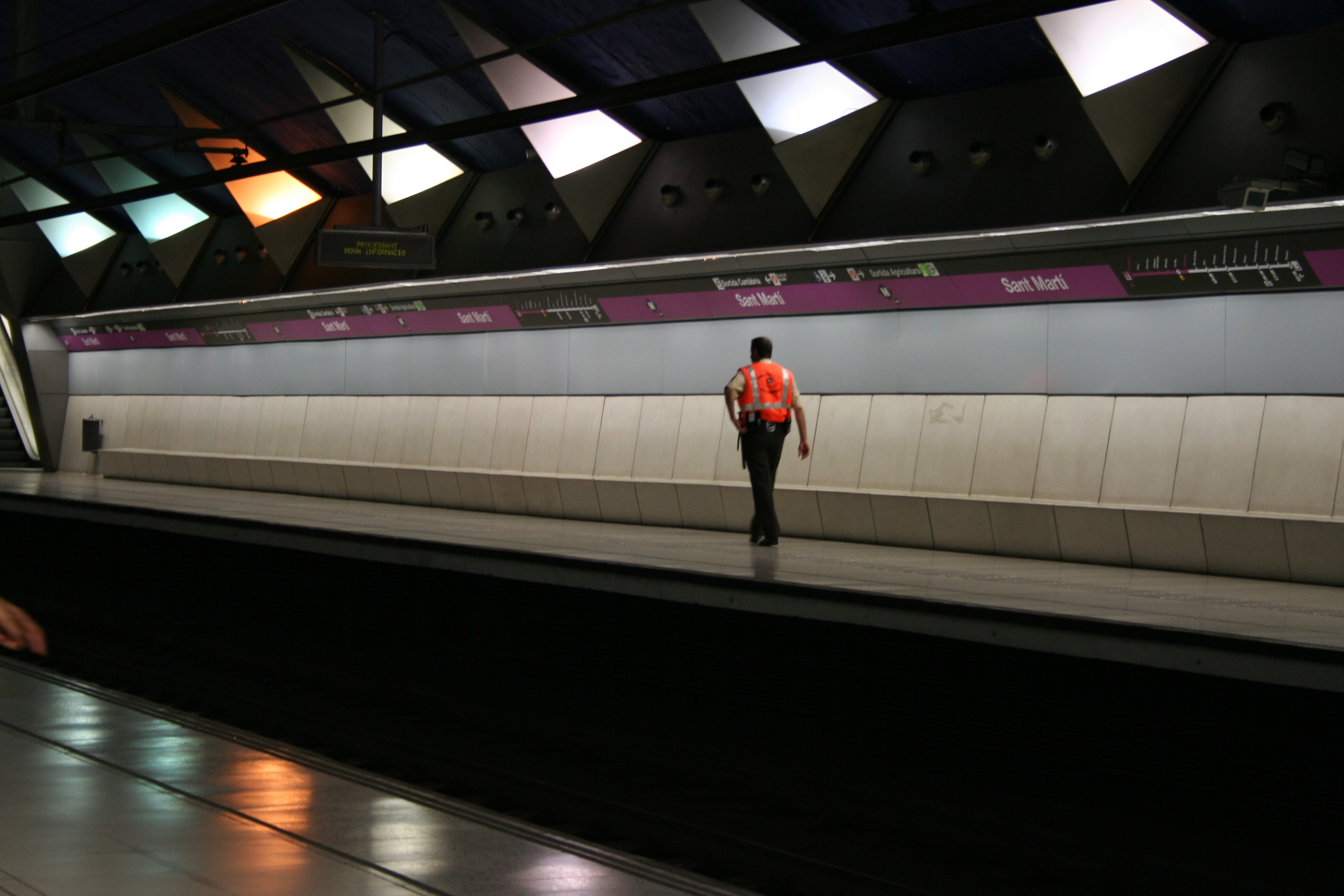 Estación de metro de Sant Martí